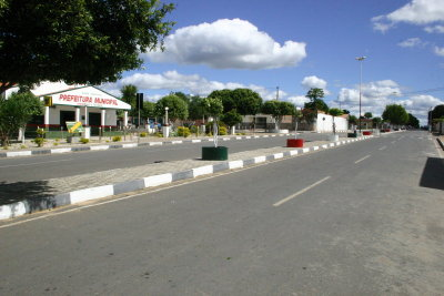 Foto da cidade de buritirama